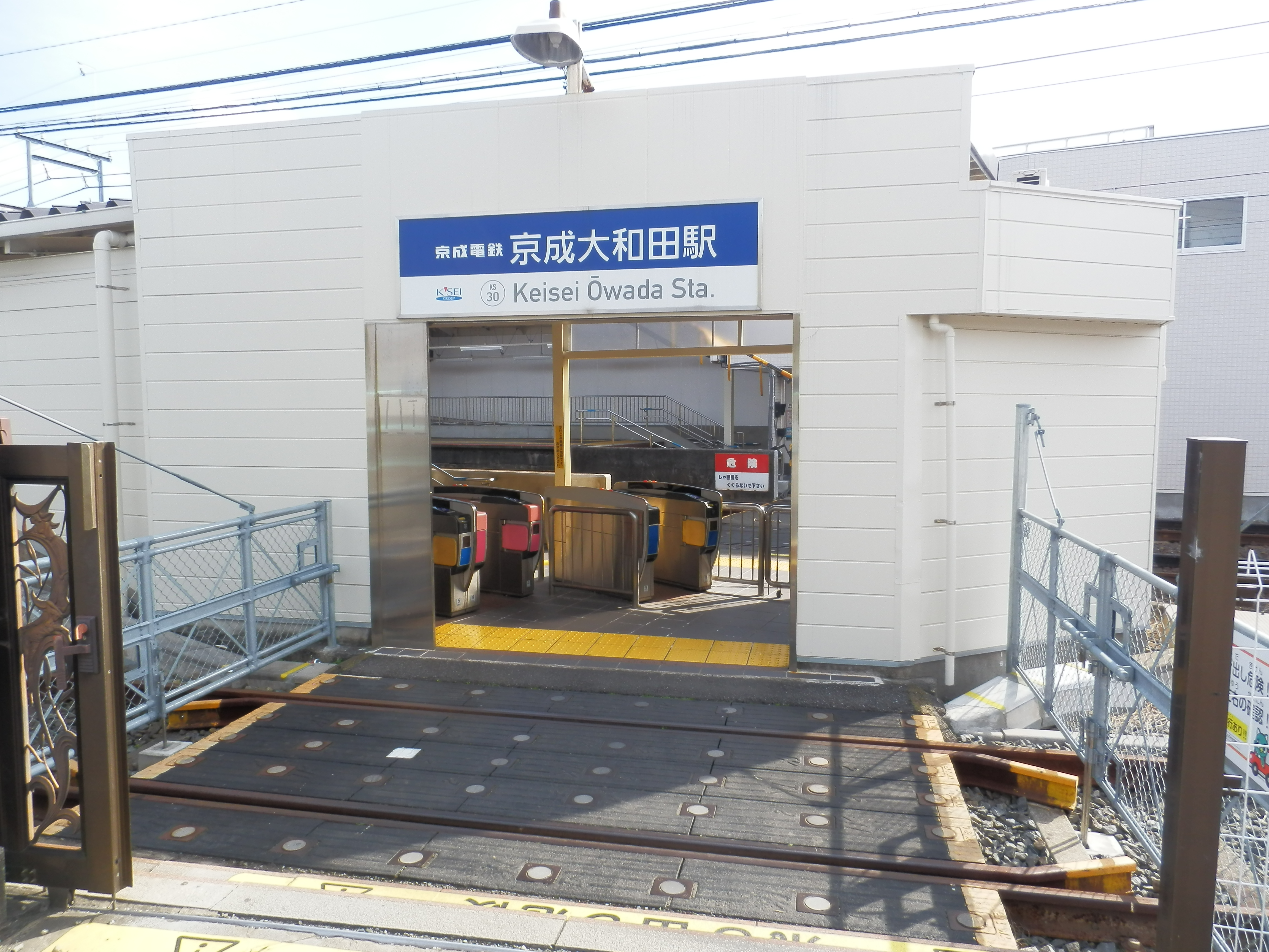 京成大和田駅北改札口